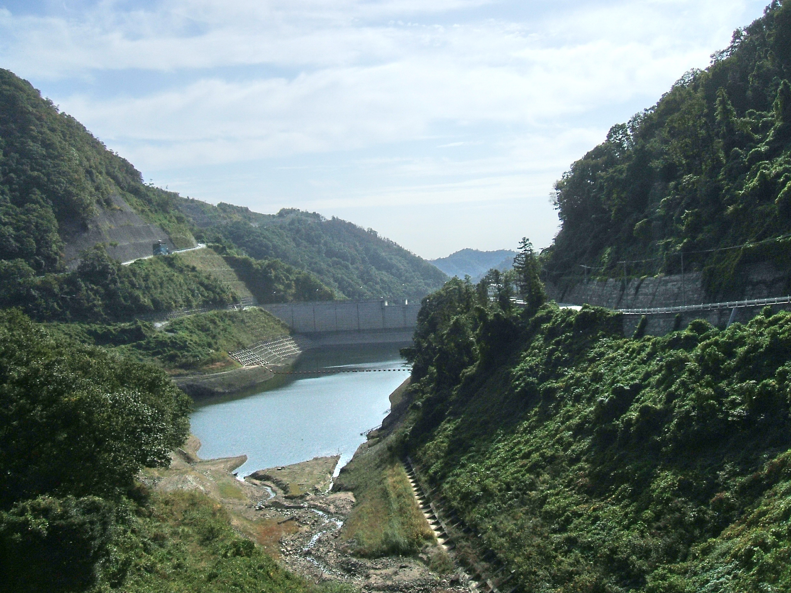 日本の広島県福山市加茂川水系四川にある四川ダムのダム湖「城山湖」の画像